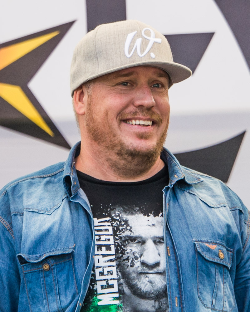 Jan Erik Westerlund på musikfestivalen Lilith Eve i Kungsträdgården i Stockholm den 11 juli 2015.